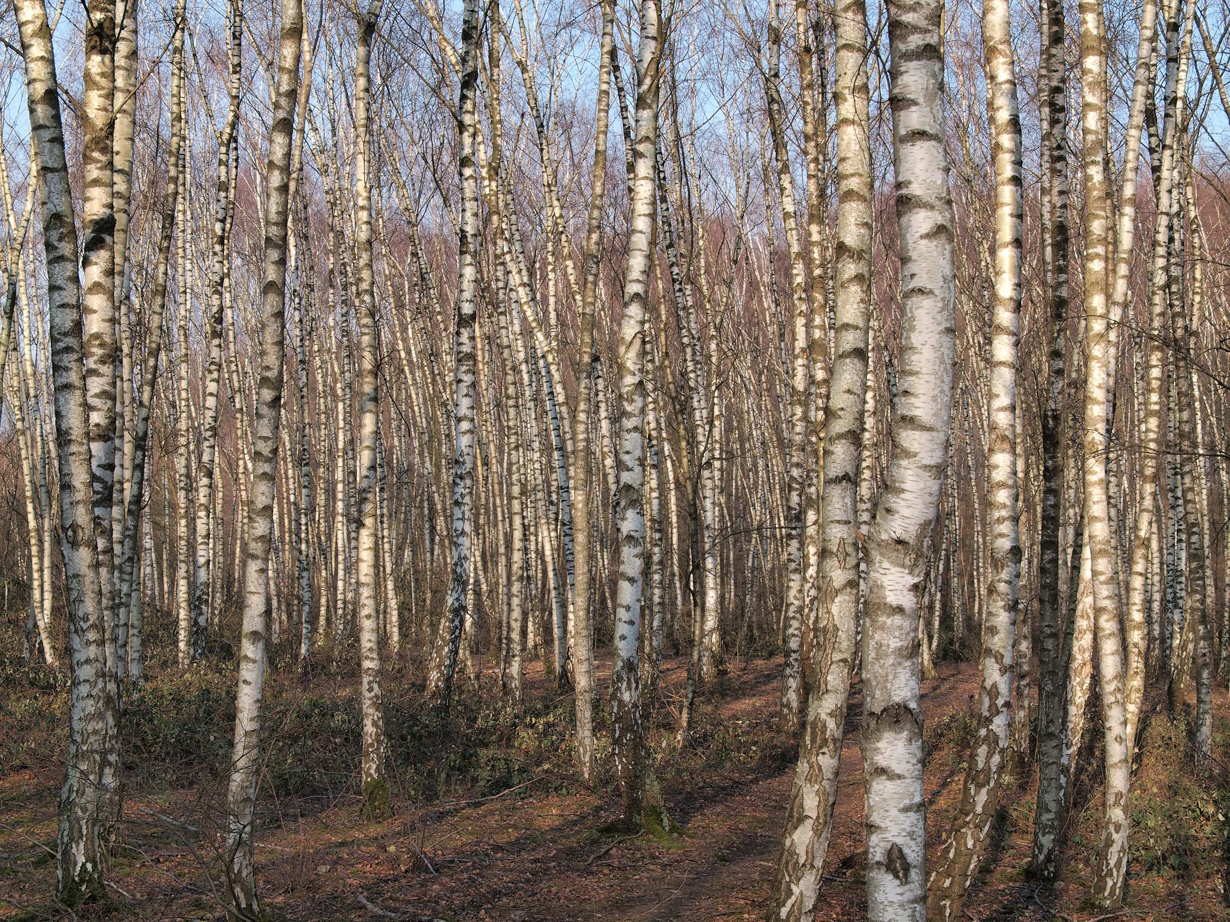 Birkenwald als Pioniergehölz auf der Halde der ehemaligen Zeche Constantin der Große in Herne